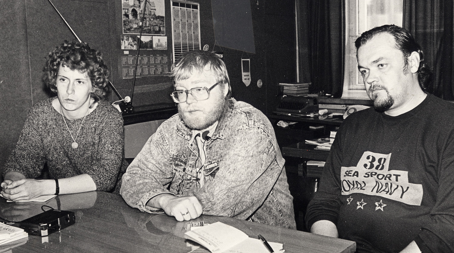 Kärt Jänes, Mart Laar ja Hannes Walter Horisondi ENE-teemalises vestlusringis aastal 1989.